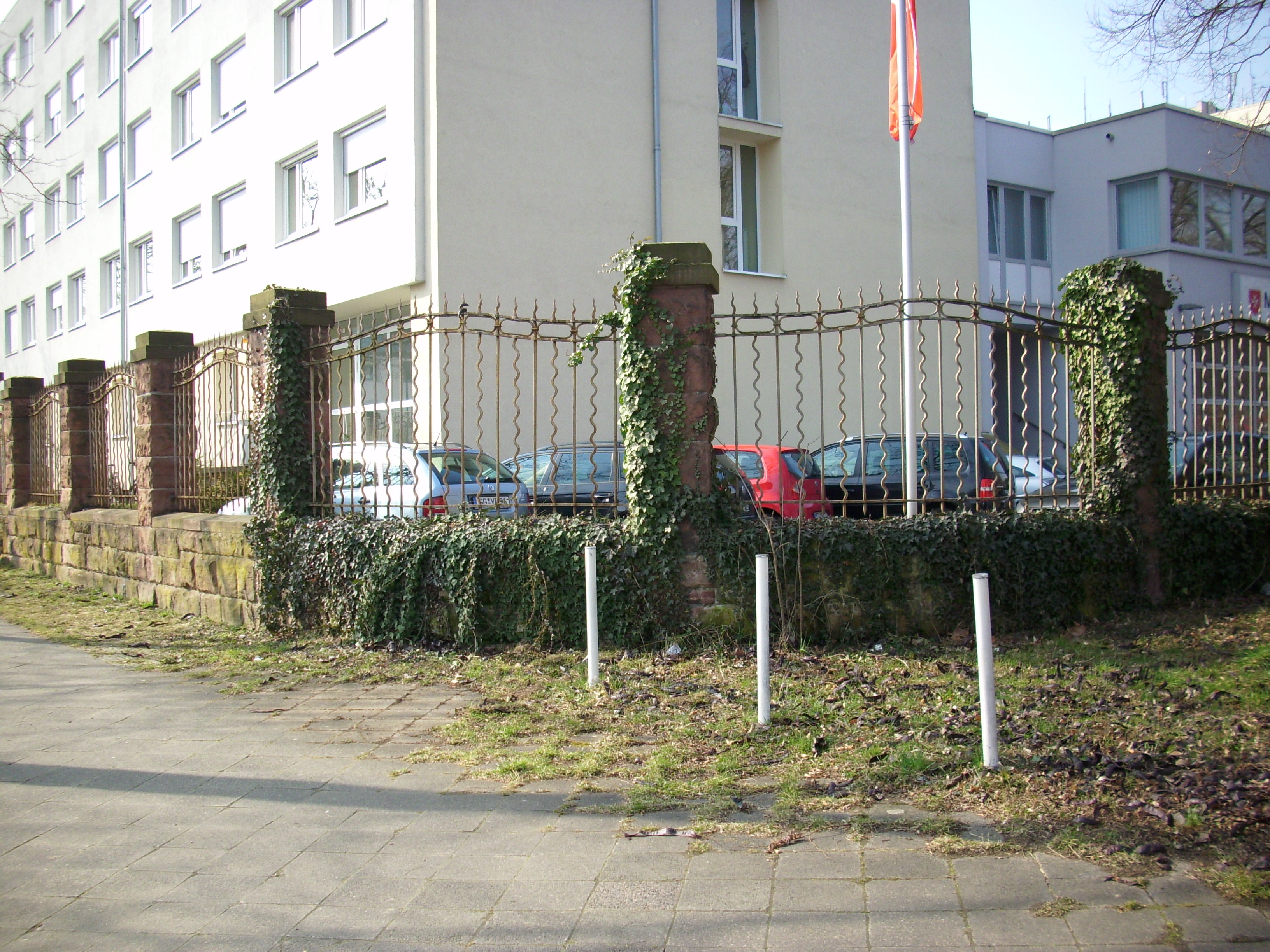 Reste der Einfriedung der ehemaligen Kaserne des Fuß-Artillerie-Regiments Nr. 3, um 1910. Fußartillerie-Regiment „General-Feldzeugmeister“ (Brandenburgisches) Nr. 3